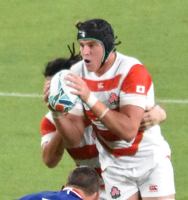 ジェームス・ムーア